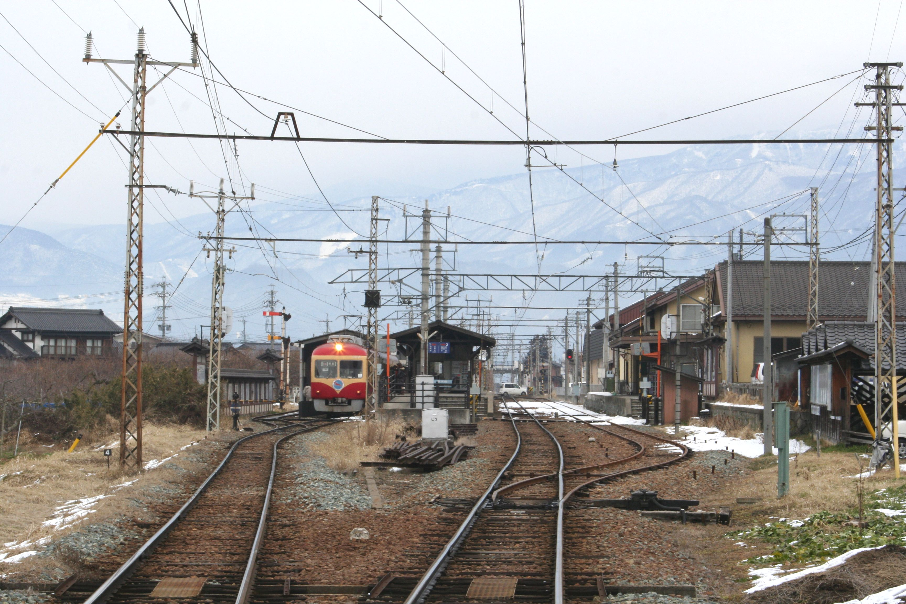 小布施駅ホーム